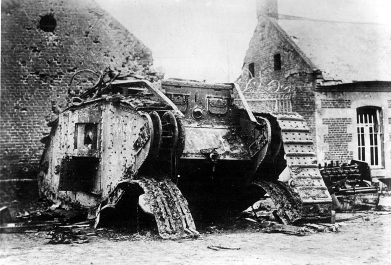 Bei Cambrai erbeuteter englischer Panzer Scherl: I. Weltkrieg 1917; in der verlorenen Tankschlacht der Engländer erbeuteter englischer Tank. ADN-ZB-Archiv I. Weltkrieg 1914-18 Westfront: Tankschlacht der Engländer bei Cambrai vom 20.-29.11.1917. U.B.z.: einen zerstörten englischen Tank bei Rumilly. 15893-17